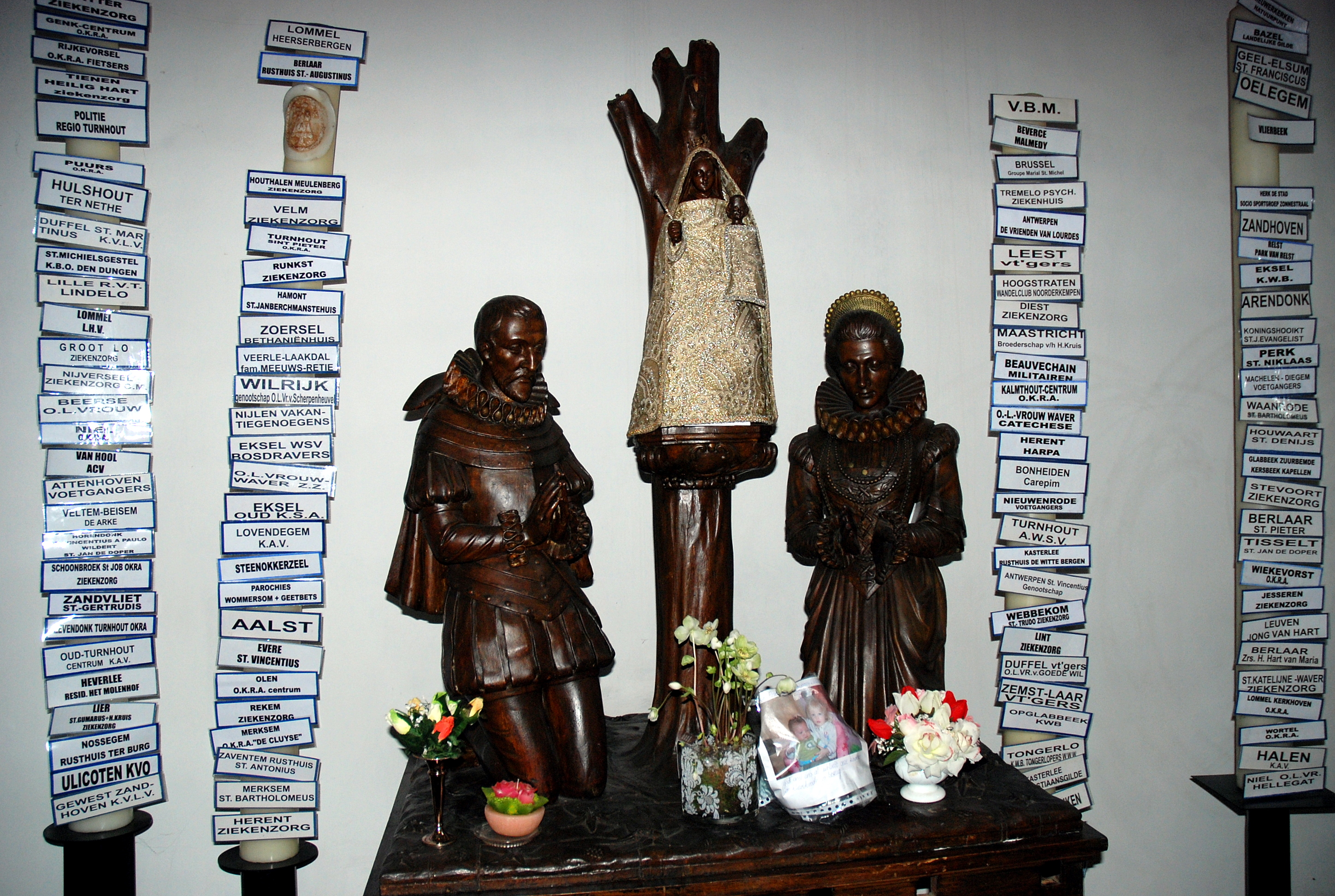 Albrecht van Oostenrijk en Isabella van Spanje in de Onze-Lieve-Vrouwebasiliek te Scherpenheuvel, België